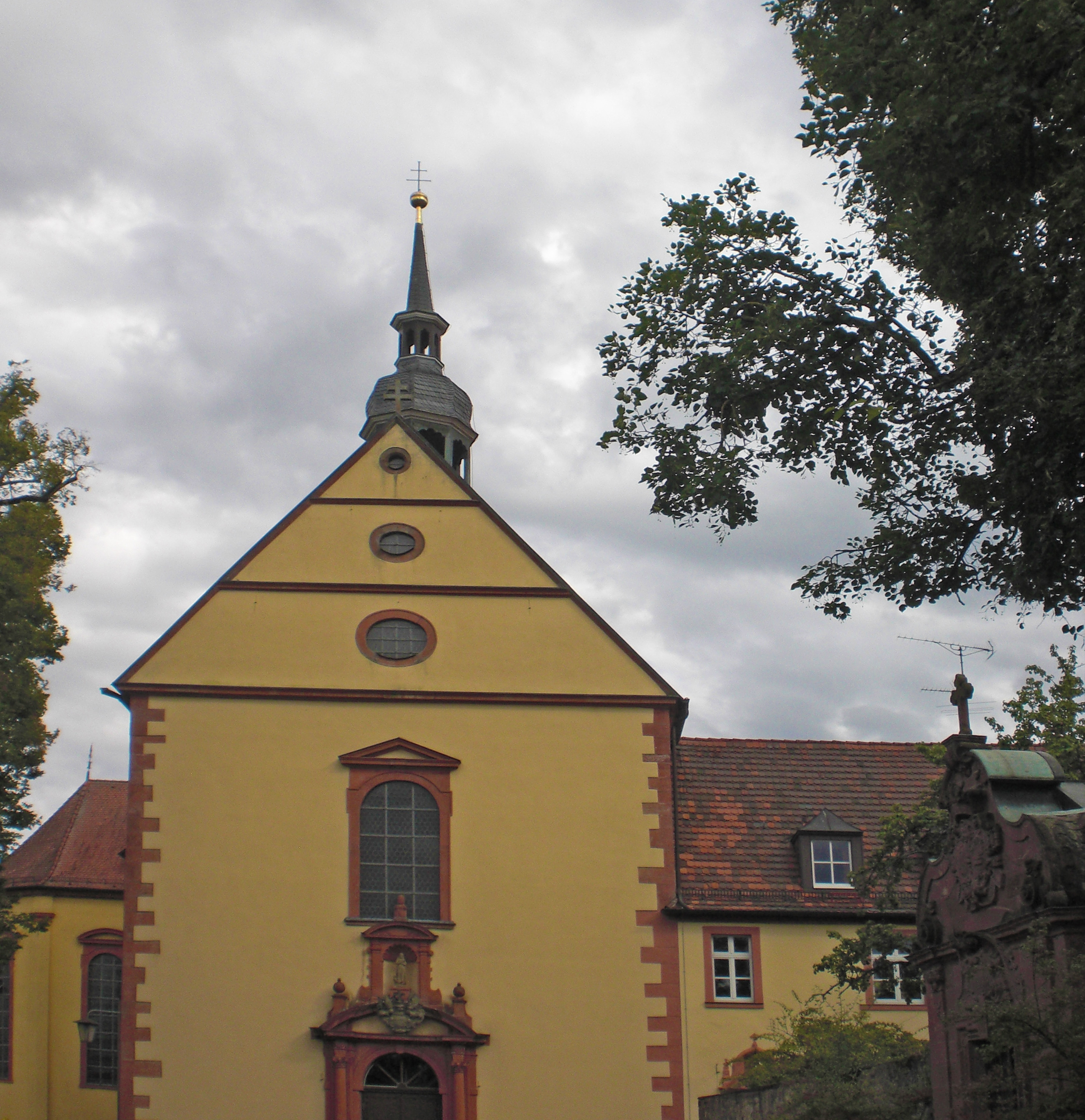 Kloster Altstadt in Hammelburg